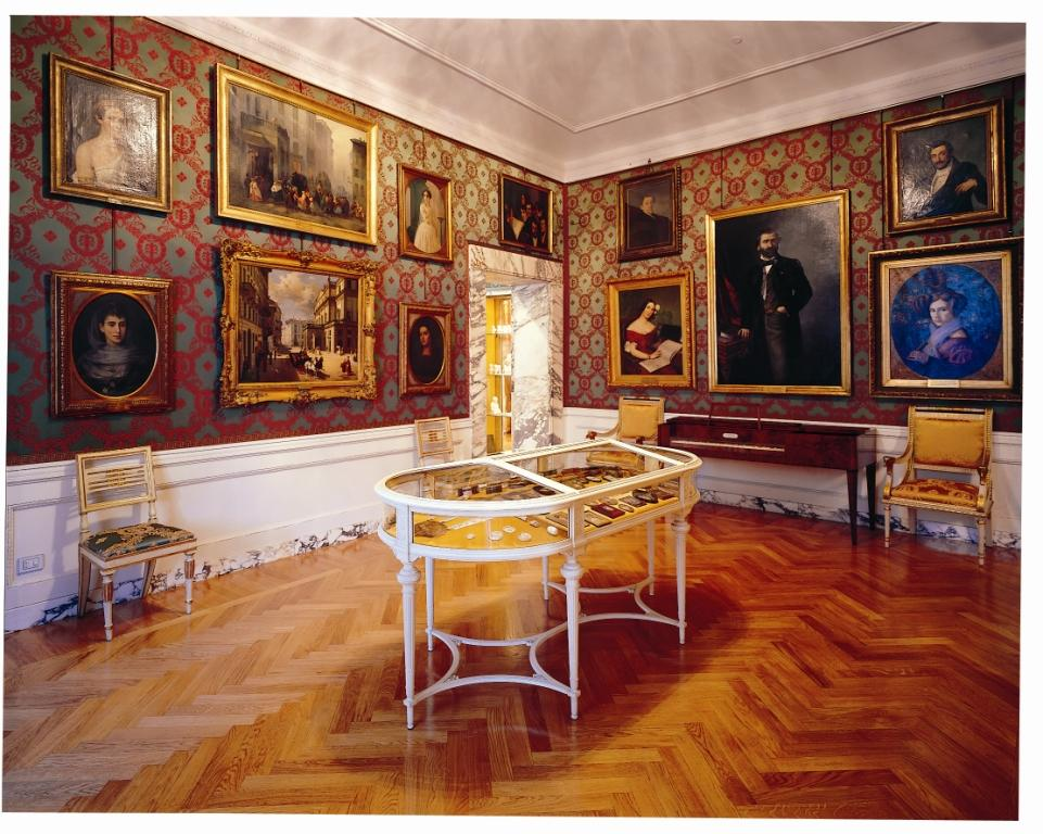 Quarta sala del Museo Teatrale alla Scala